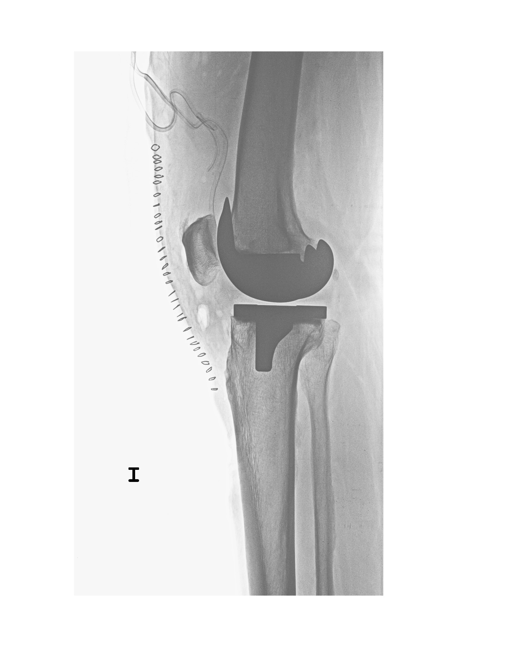 Negativo